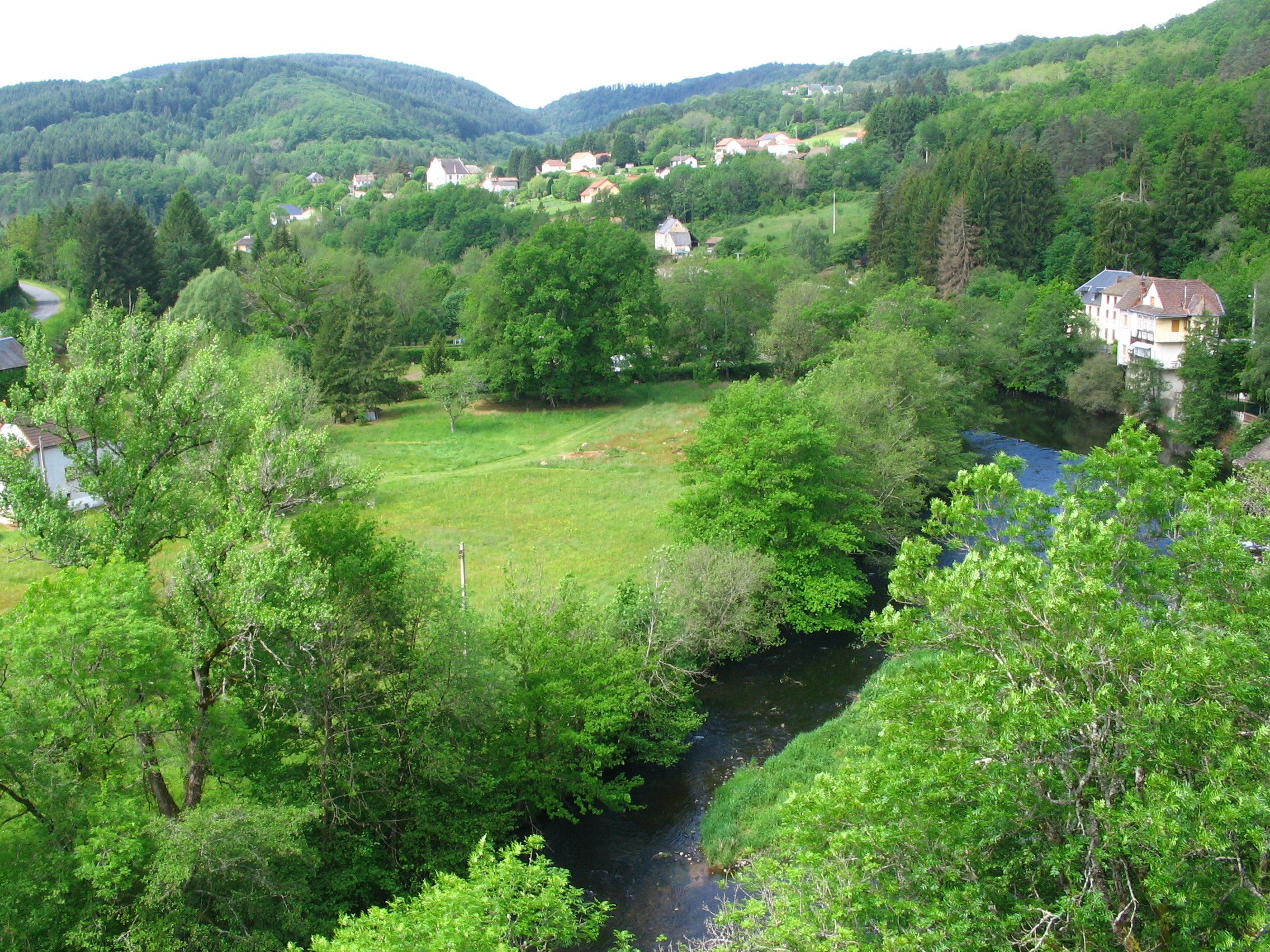 La Sioule à Châteauneuf les Bains (63), depuis promontoire du pic Alibert.